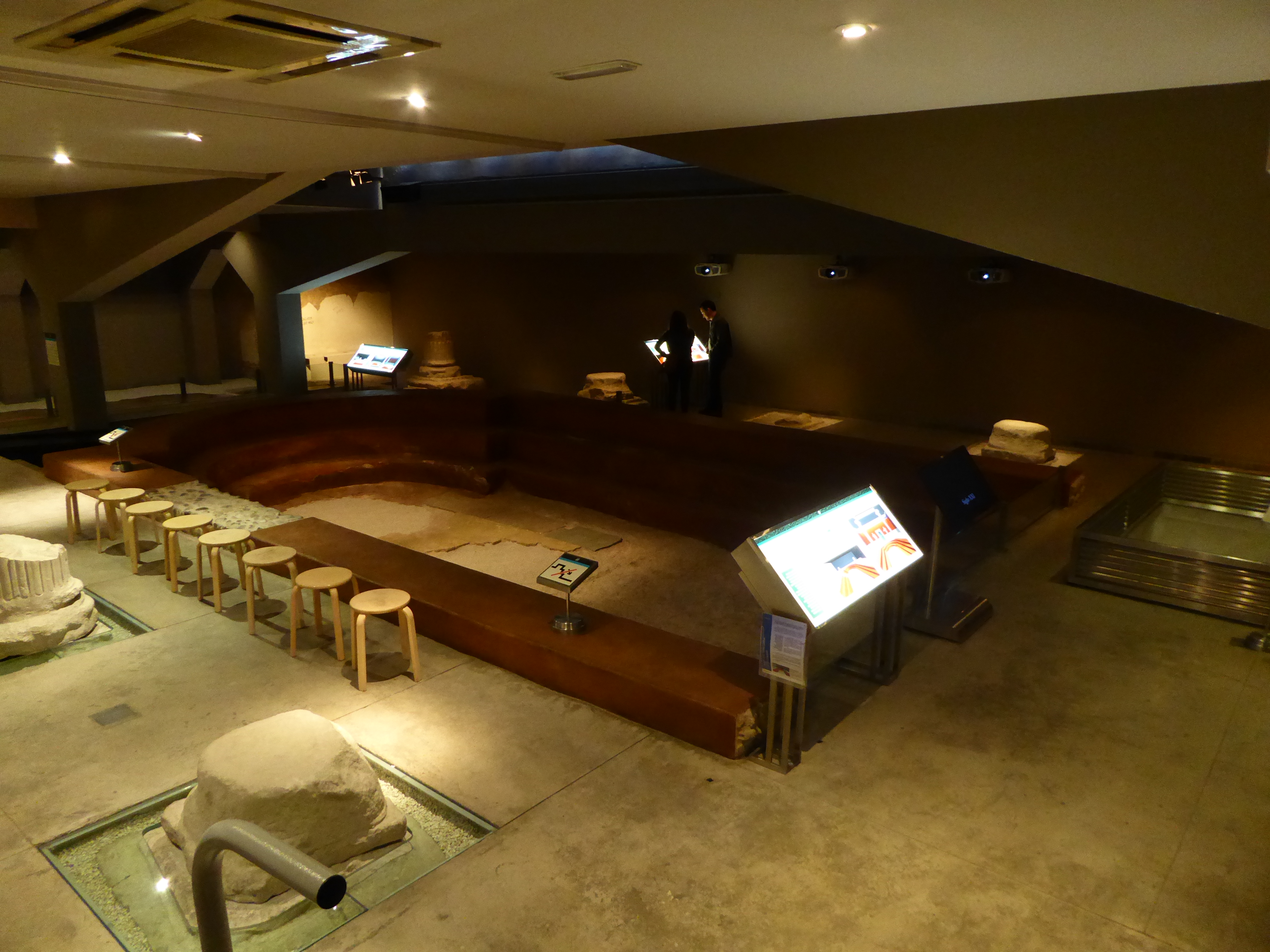 Vista